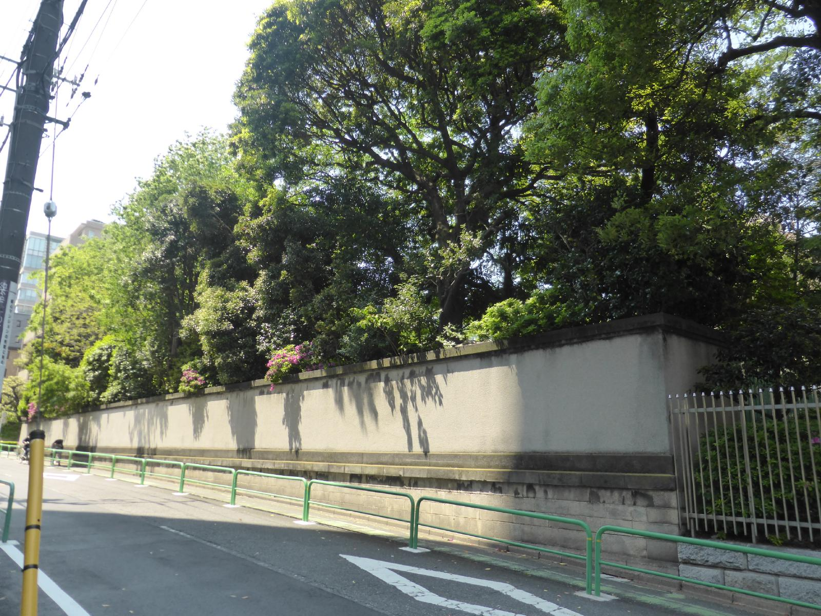 敷地が広いローマ法王庁